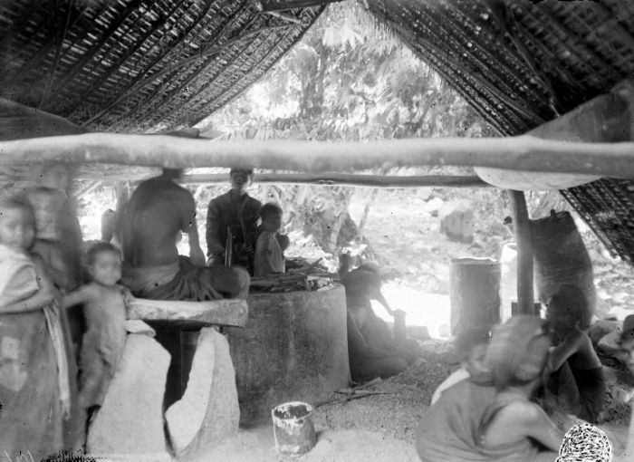 Negatief. Kalkbranderij te Haranggaul bij het Tobameer